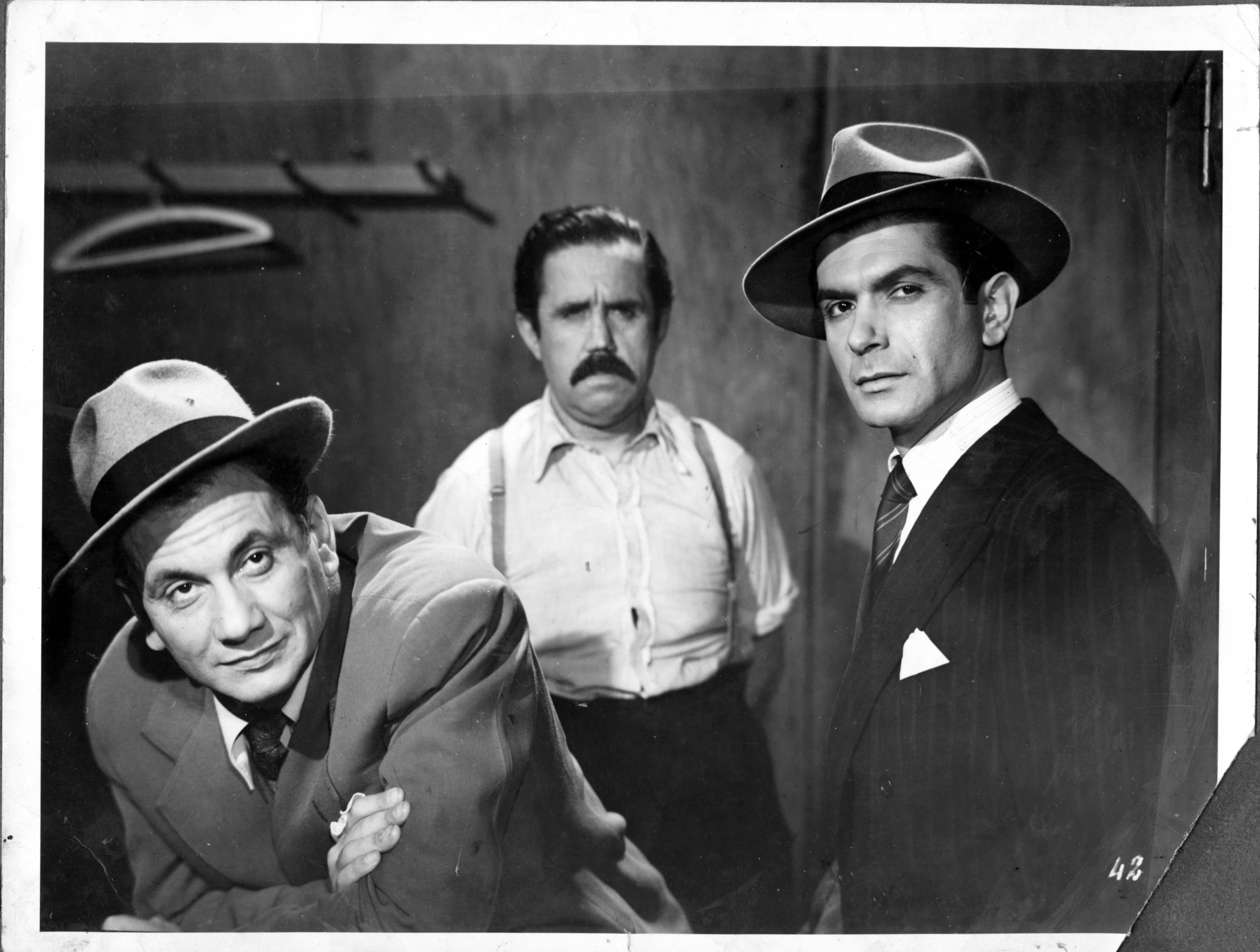 Durante un descanso de la filmación de la película Nace un Campeón